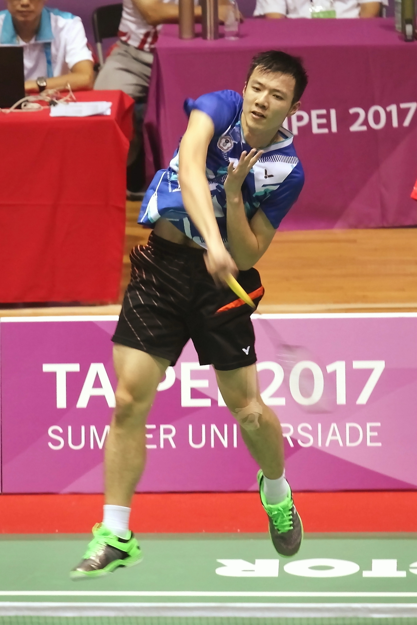 2017 台北世大運個人男單 王子維 01